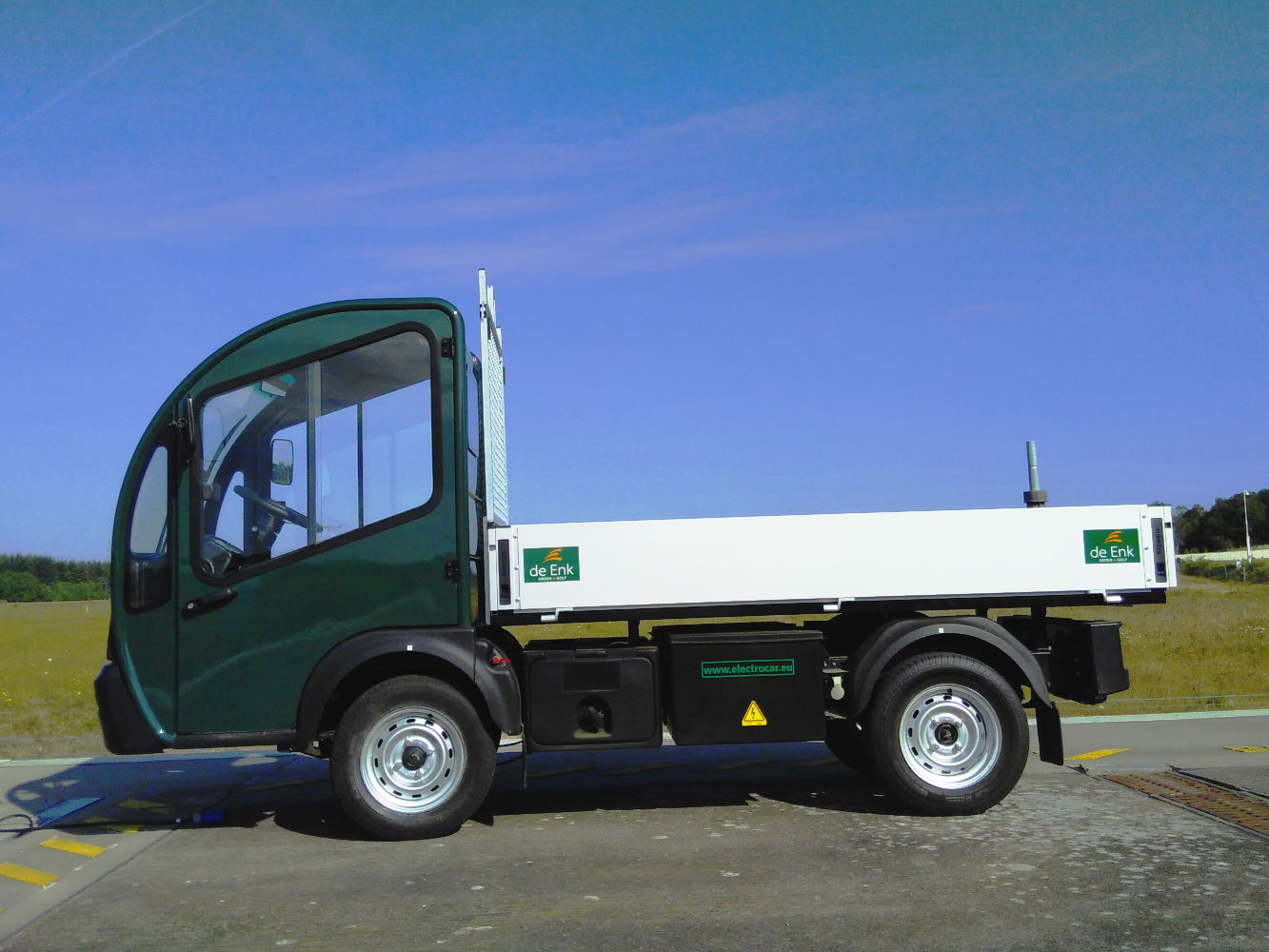 Electrocar vehicle used by De Enk Groen & Golf B.V., The Netherlands.